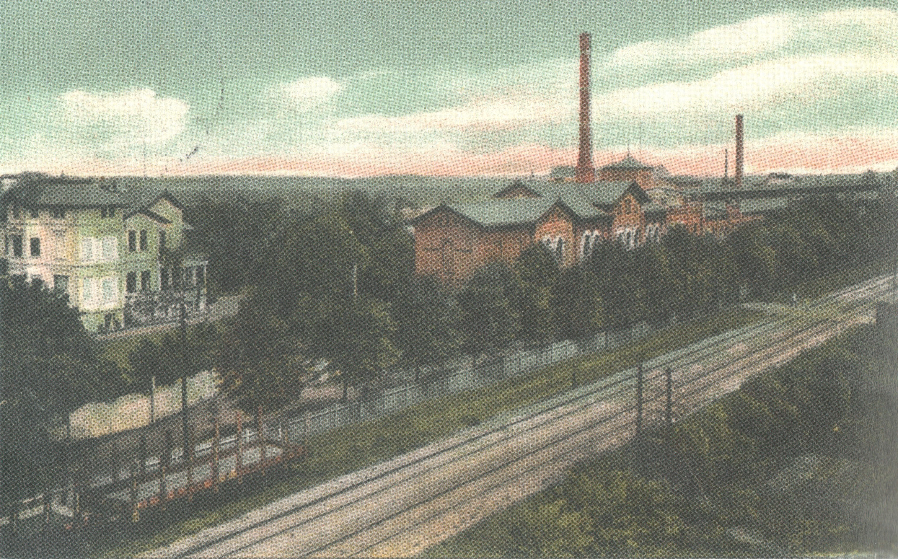 Nordwolle und Villa Lahusen (links) um 1900